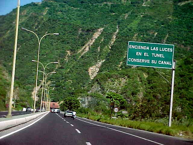 Autopista Caracas - La Guaira en el estado Vargas - Venezuela a un año de del deslave de diciembre de 1999 (2000)